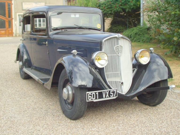 Peugeot 601 C Berline 0193